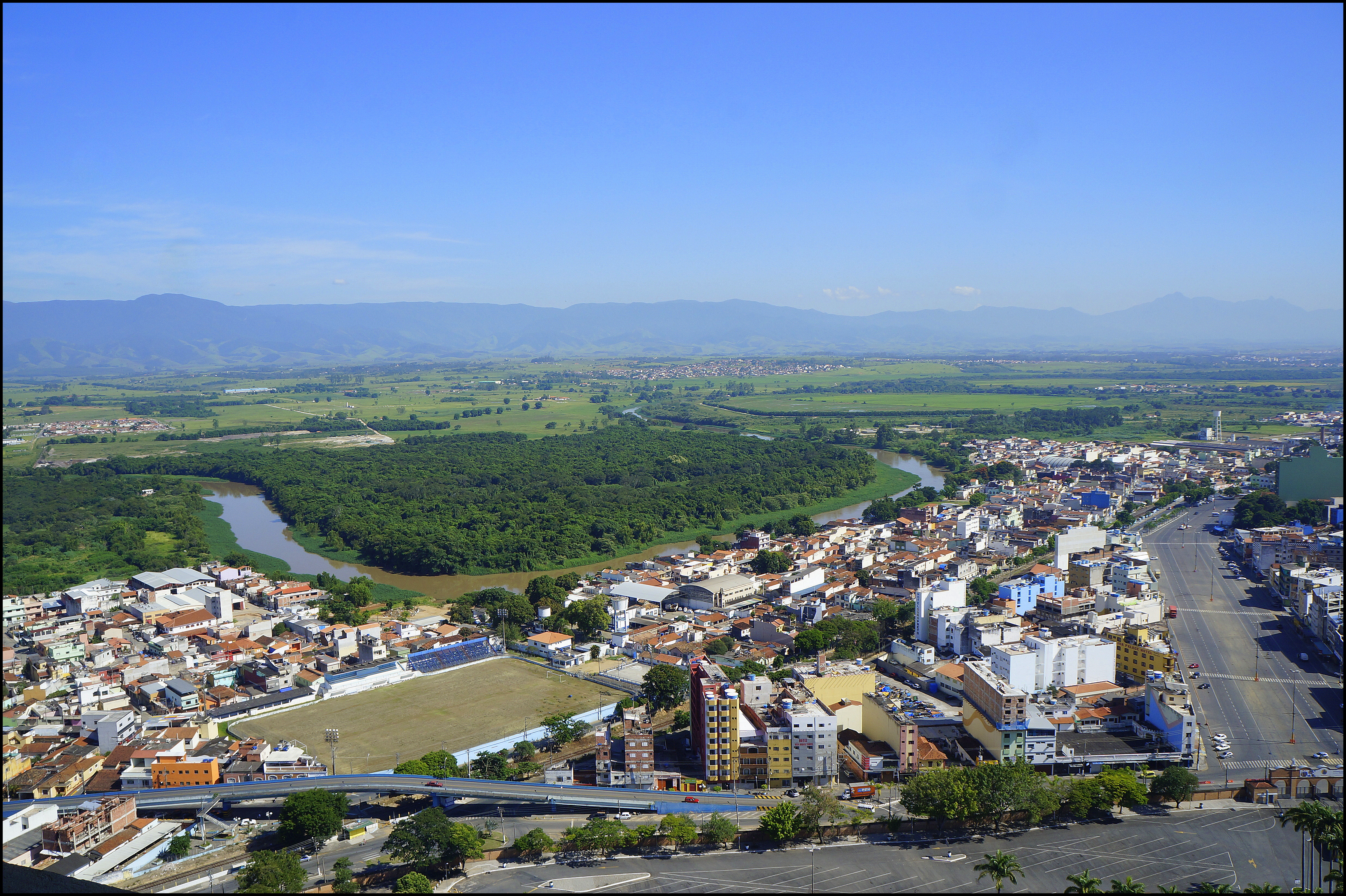 Aparecida - SP